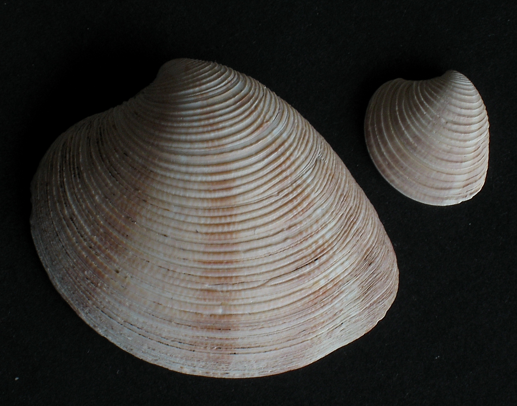 Mistaken identity, this is in fact Chamelea gallina